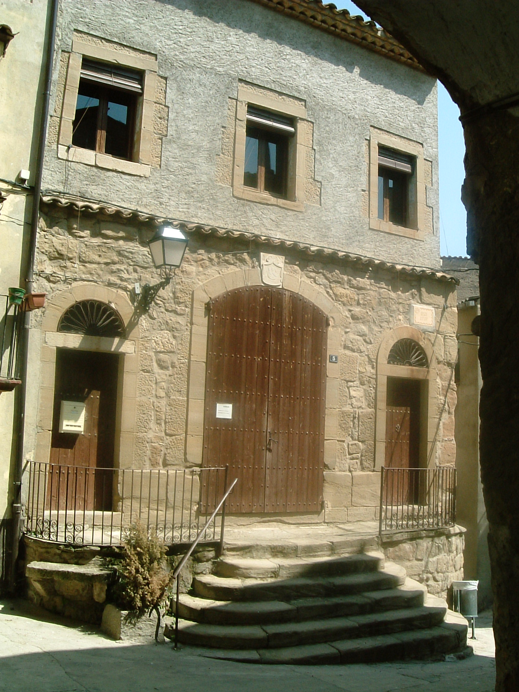 Façana del Museu d'Artesa de Segre